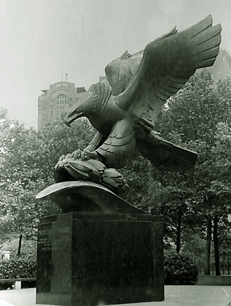 Navy Memorial